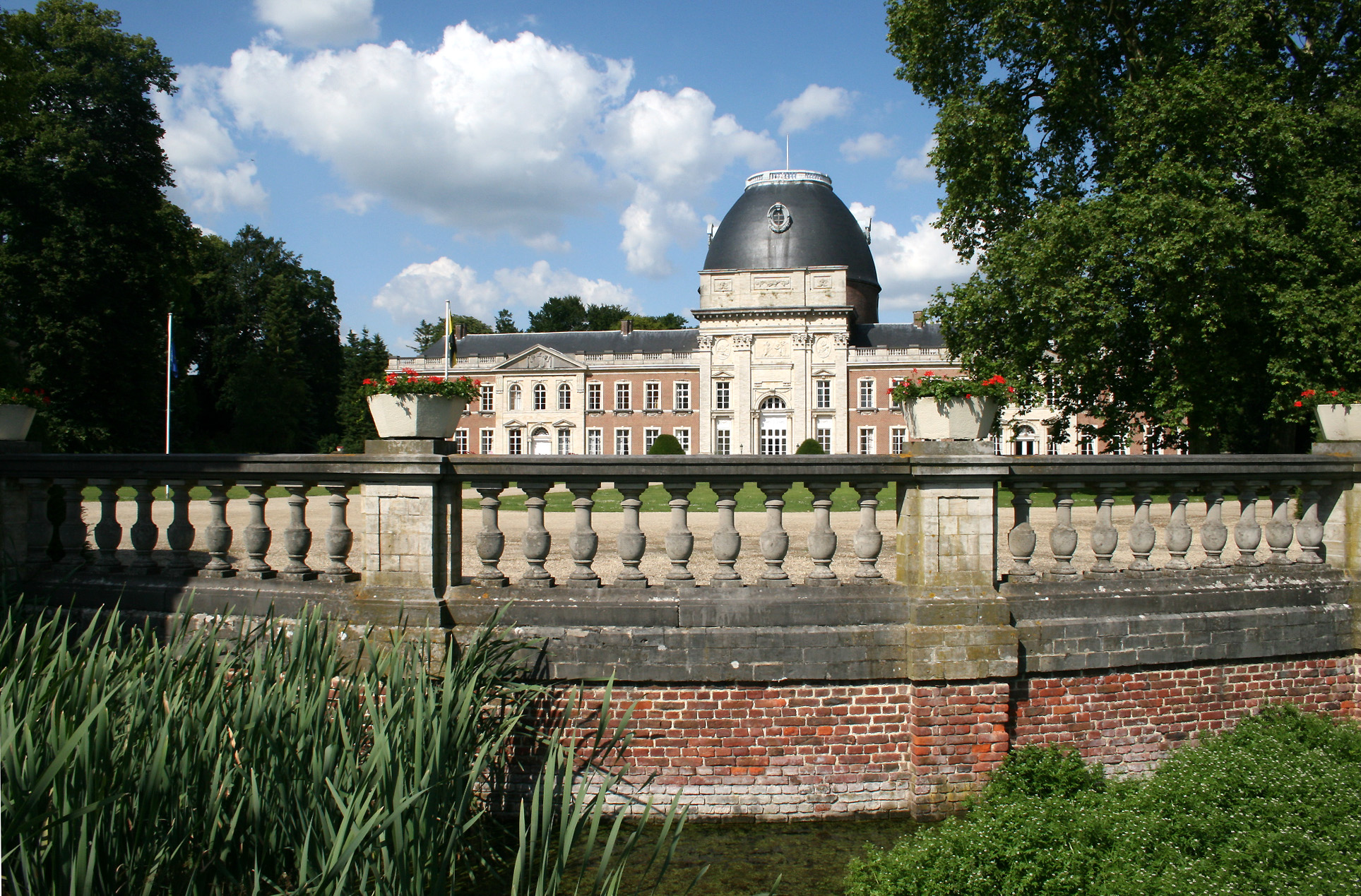 Opheylissem, les deux ailes de la prélature et la tour de l'église de l'ancienne abbaye (1760-1780). Walon: Opélissème, lès deûs costès dol prélatûre èt l'toûr di l'ancyin.ne abéye (1760-1780).